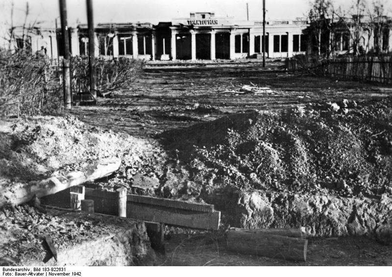 Russland, Kampf um Stalingrad, Zerstörungen Das zerstörte Traktorenwerk in der Festung Stalingrad. PK-Aufnahme: Kriegsberichter Bauer-Altvater (Sch) 7.11.42 [Herausgabedatum] (6186) [Sowjetunion.- Schlacht um Stalingrad] Information added by Wikimedia users.